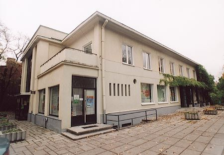 Kauno valstybinis lėlių teatras.